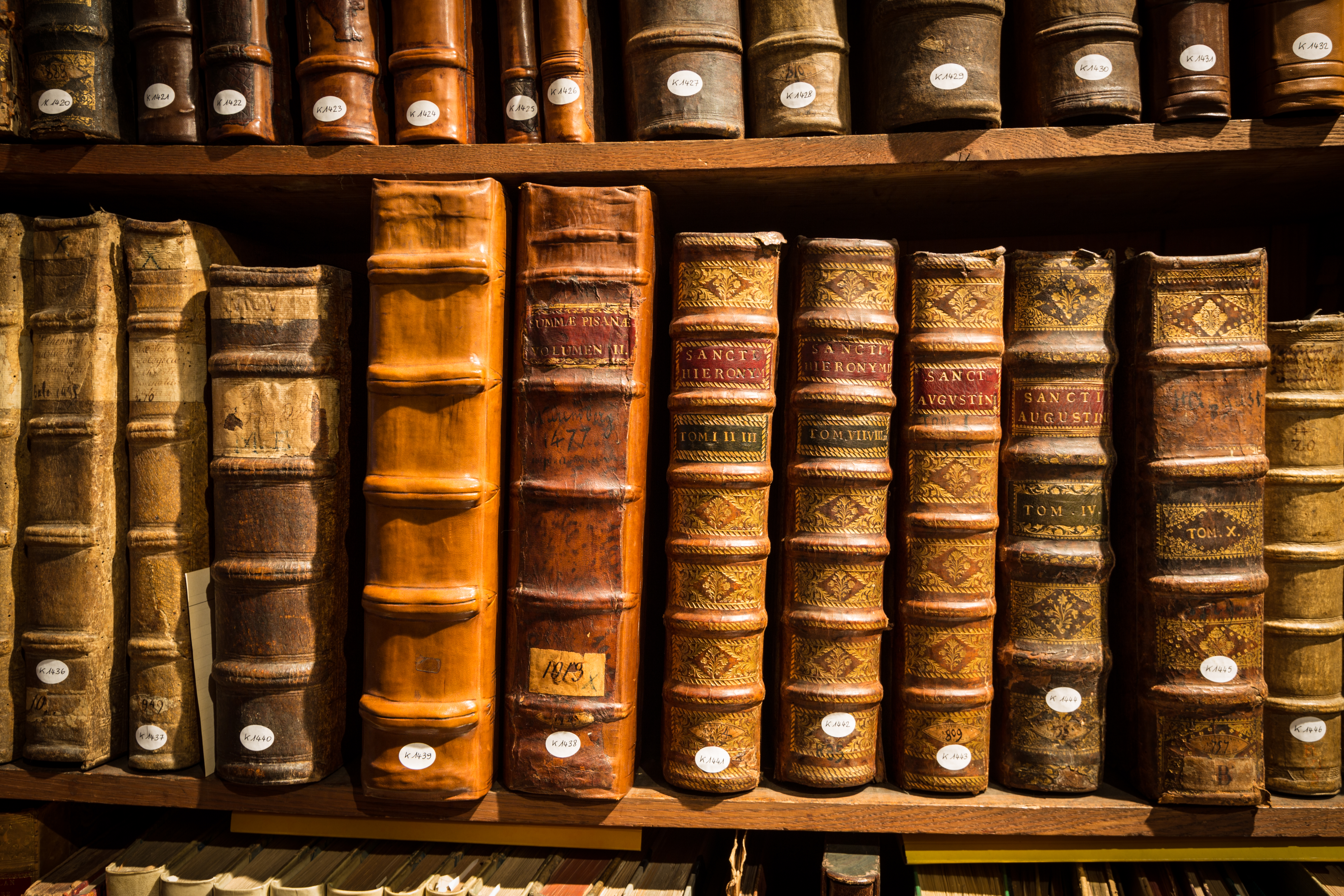 Bibliothèque humaniste de Sélestat 21 janvier 2014. Descriptions à venir